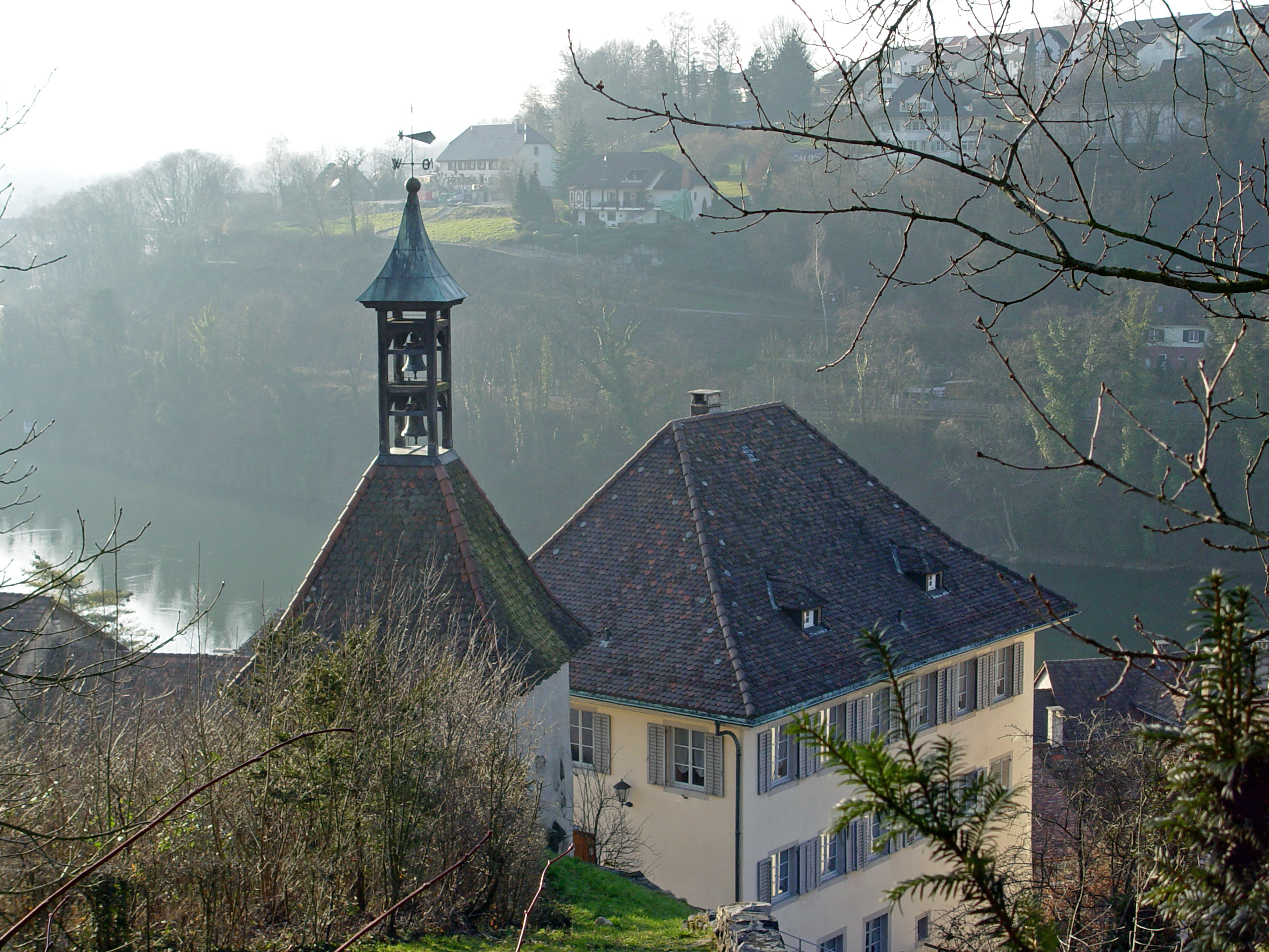 Diese Totenglocke in der Kapelle vor dem Standesamt in Laufenburg ist heute noch im Betrieb. Auf dem Bild ist sowohl die Kapelle als auch das Zivilstandesamtgebäude zu sehen. Mittels eines unten angebrachten Seils verkündet man Todesfälle in Laufenburg.